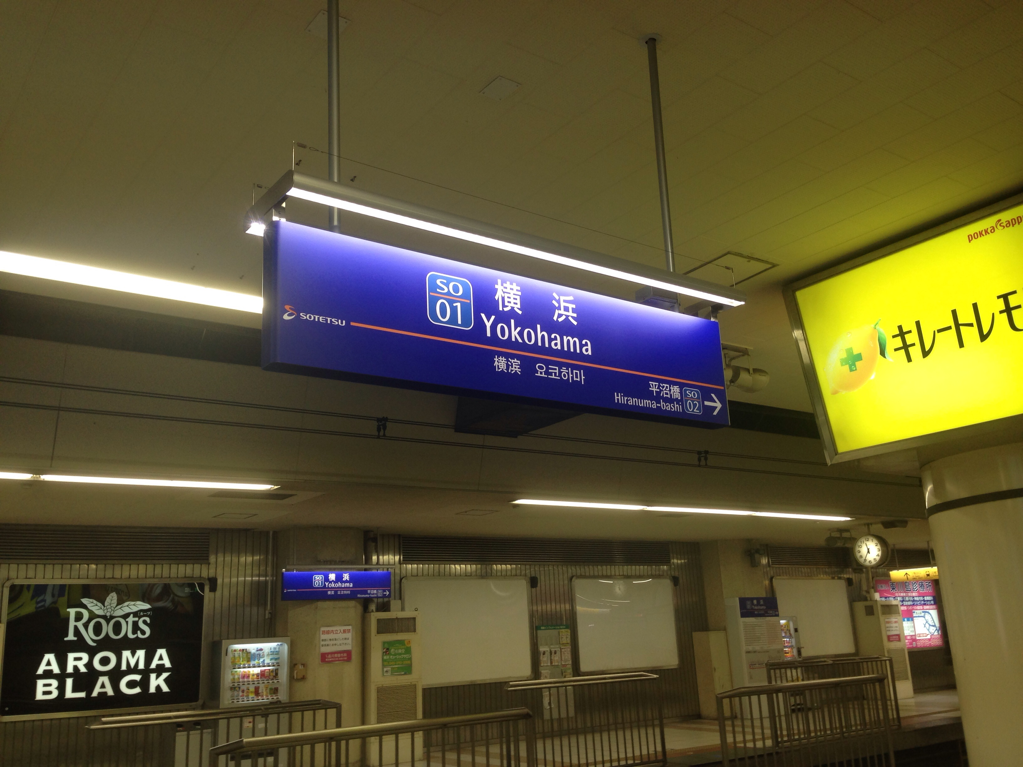 相鉄線 横浜駅、駅標はLEDによる新型サイン。相鉄線では2014年2月末より駅ナンバリングを順次導入しており、当駅は SO-01 となっている。